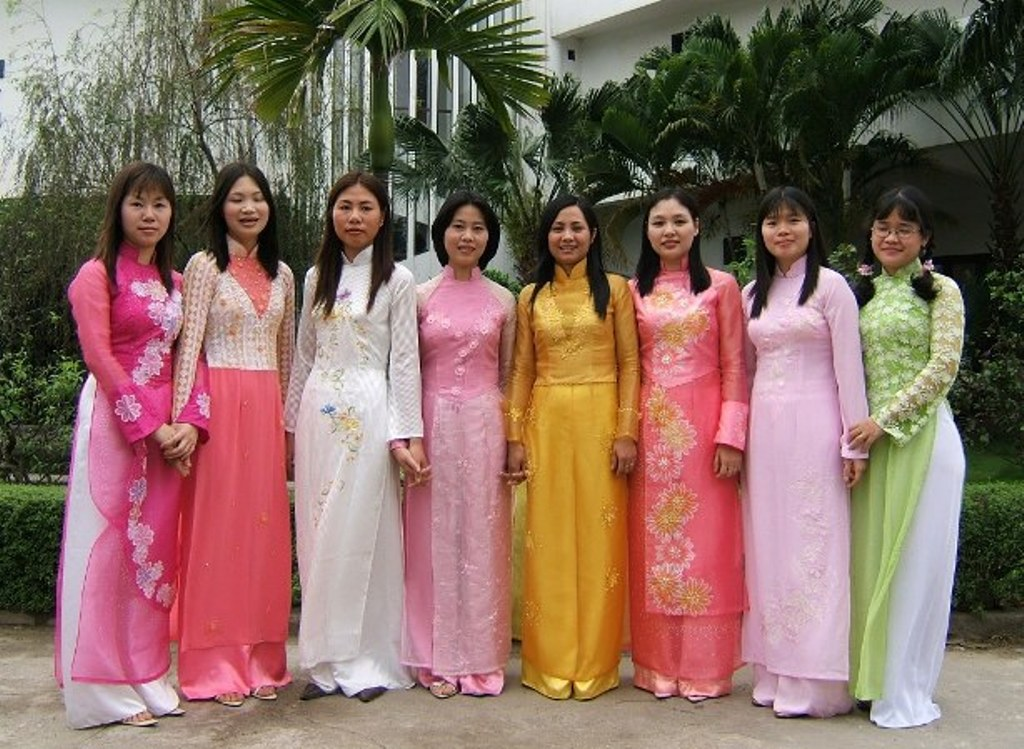 Фасоны аозай